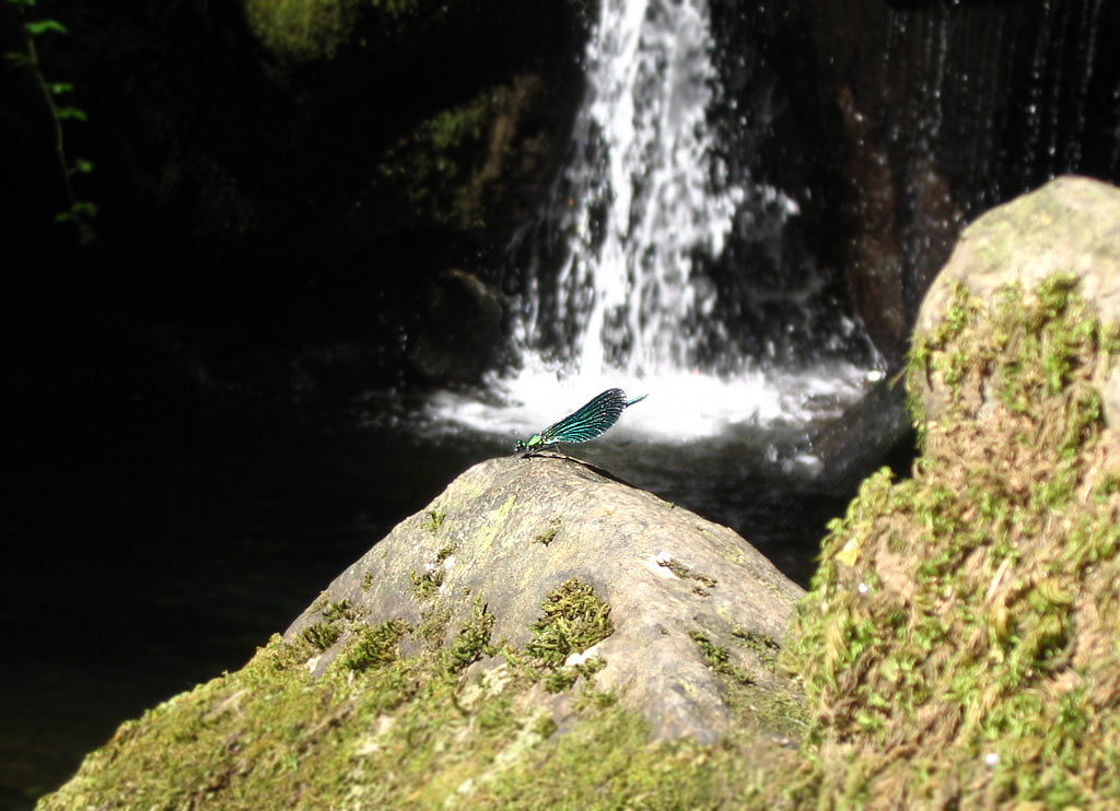 Libélula nas Fragas do río Eume, Galiza